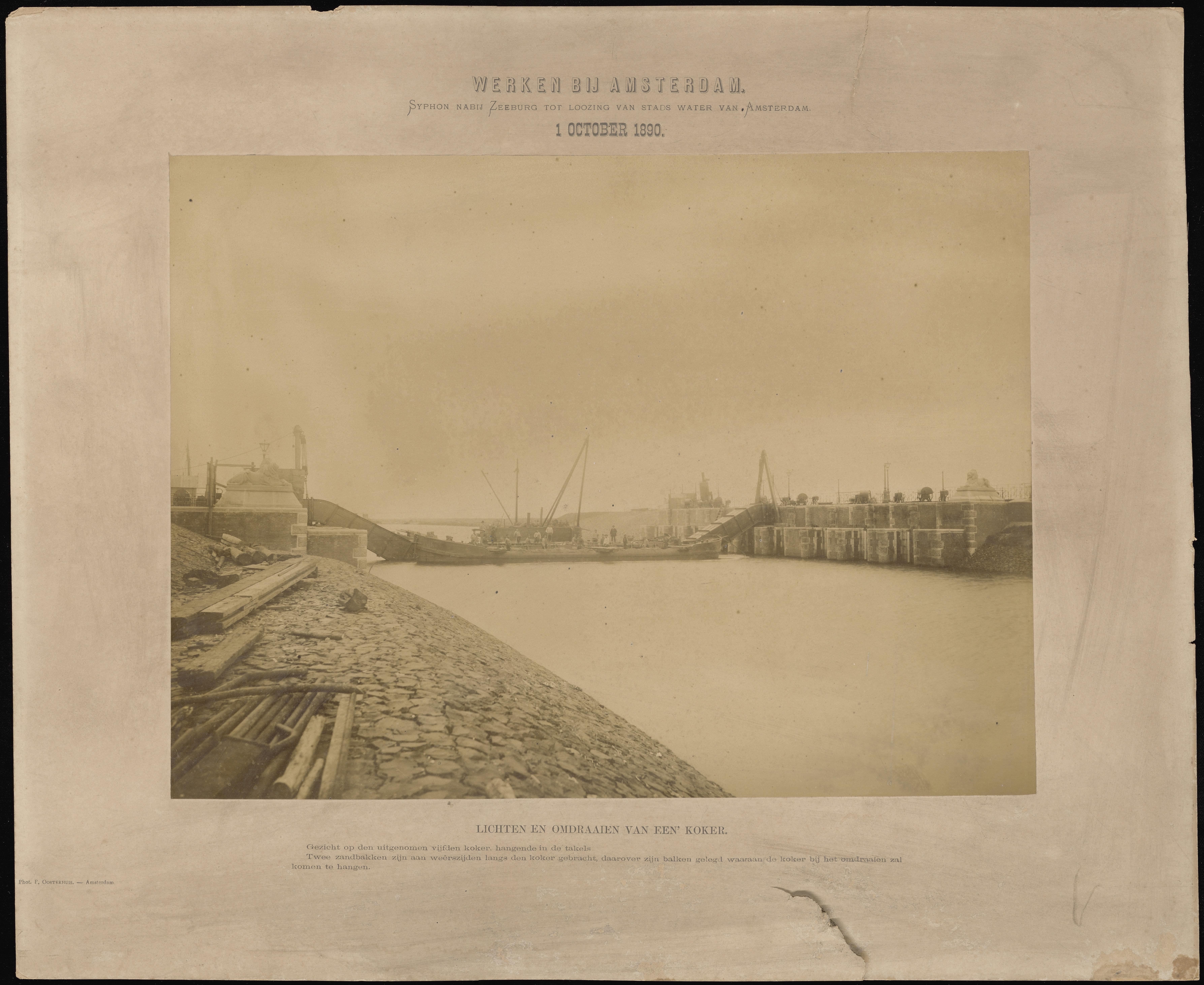 Beschrijving Werken bij Amsterdam Aanleg van het Amsterdam-Merwedekanaal (Amsterdam-Rijnkanaal). "Syphon nabij Zeeburg tot loozing van stads water van Amsterdam". Het lichten en omdraaien van een koker in de syphonsluis. Documenttype foto Vervaardiger Oosterhuis, Gustaaf (1858-1938) Collectie Collectie Stadsarchief Amsterdam: foto-afdrukken Datering 1 oktober 1890 Geografische naam Amsterdam-Rijnkanaal Lozingskanaal Inventarissen Afbeeldingsbestand ANWS00110000001 Generated with Dememorixer